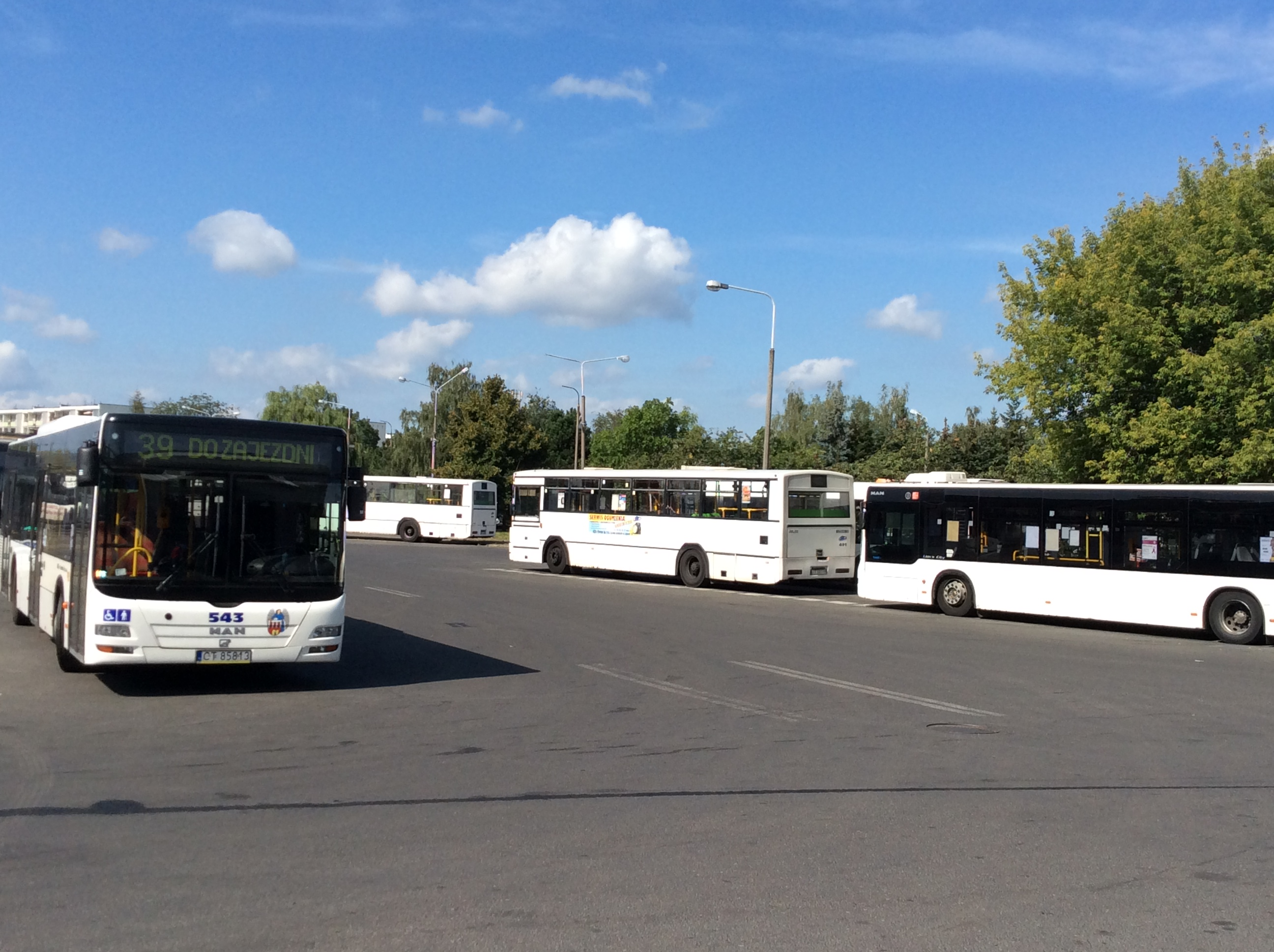 Zajezdnia autobusowa w Toruniu4